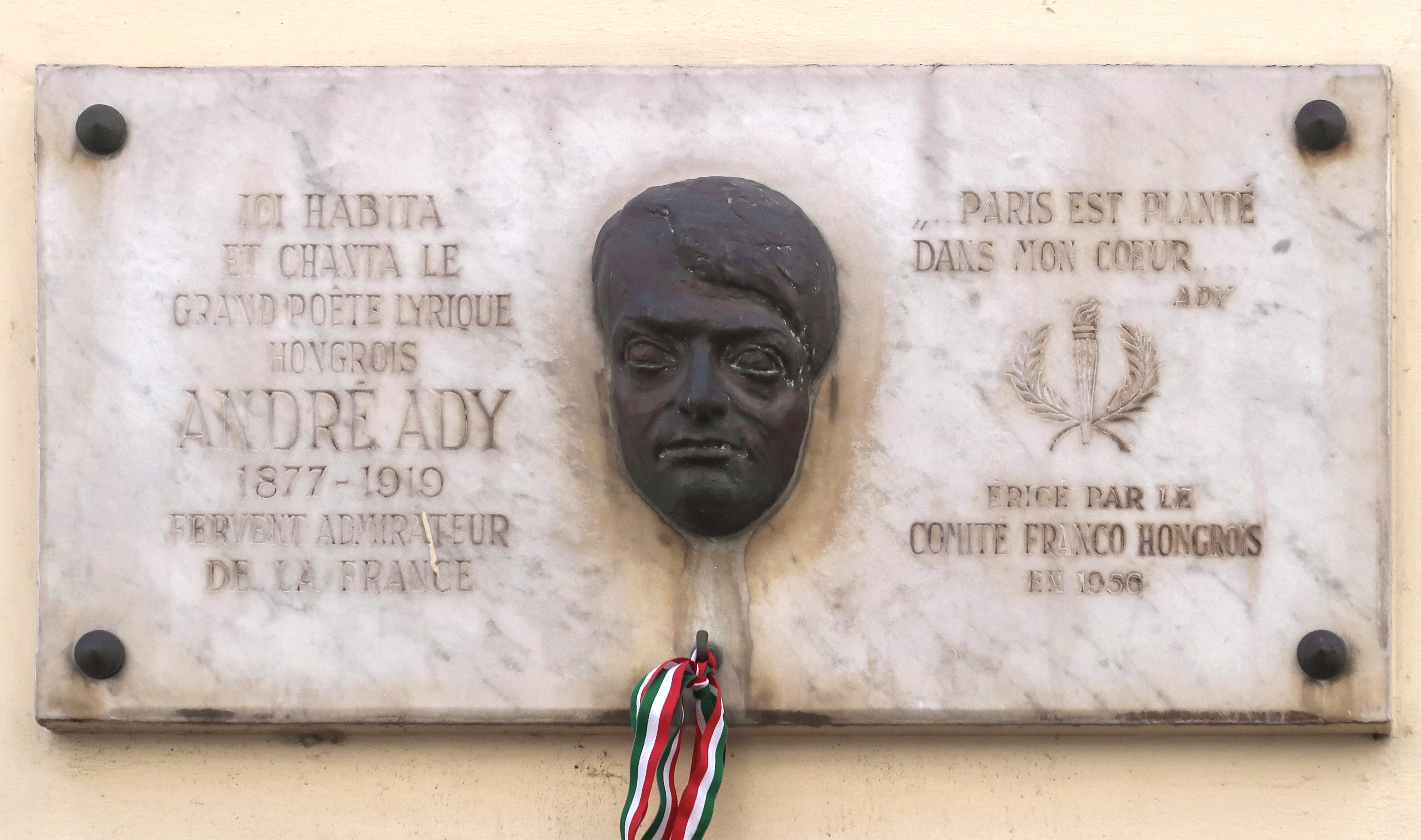 Plaque en hommage au poète hongrois André Ady, 3 rue Casimir-Delavigne (Paris, 6e).